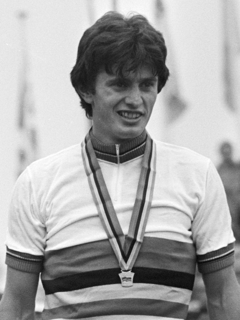 Gianni Giacomini. Wereldkampioenschappen Wielrennen 1979 te Valkenburg